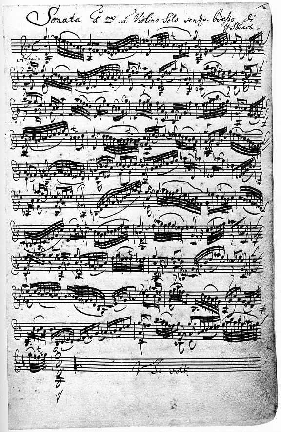 Автограф первой страницы Adagio из скрипичной сонаты Баха BVW 1001